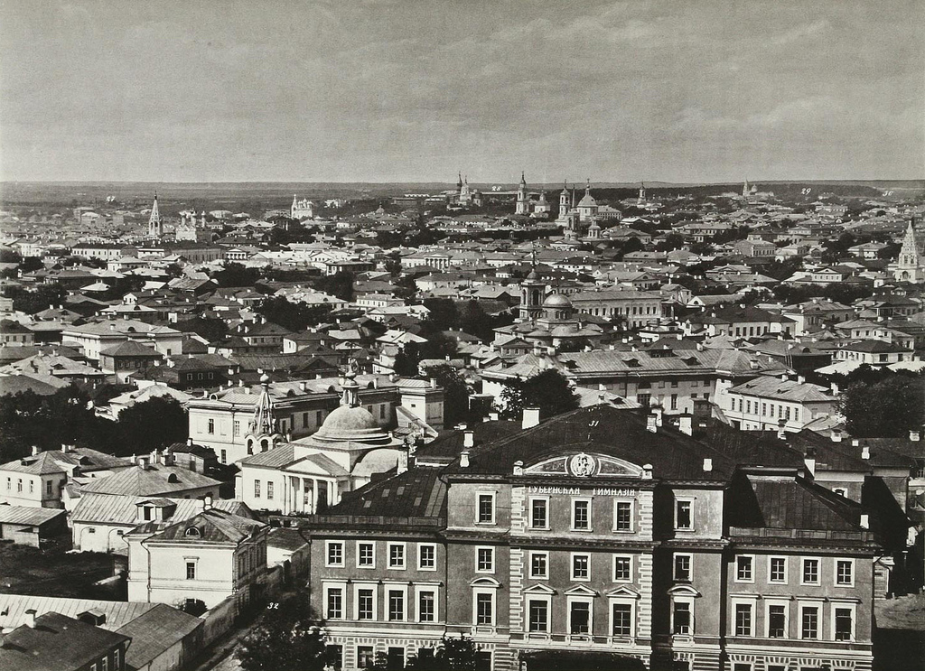 Вид на Пресню с храмом Девяти мученников кизических "на кочерыжках", рядом с которым сейчас возвышается мэрия (здание СЭВ). Здание Первой гимназии, где в 1861 году впервые экспонировалось в Москве «Явление Мессии». Панорама из альбома Найденова. 1867. ГНИМА им. А.В.Щусева.